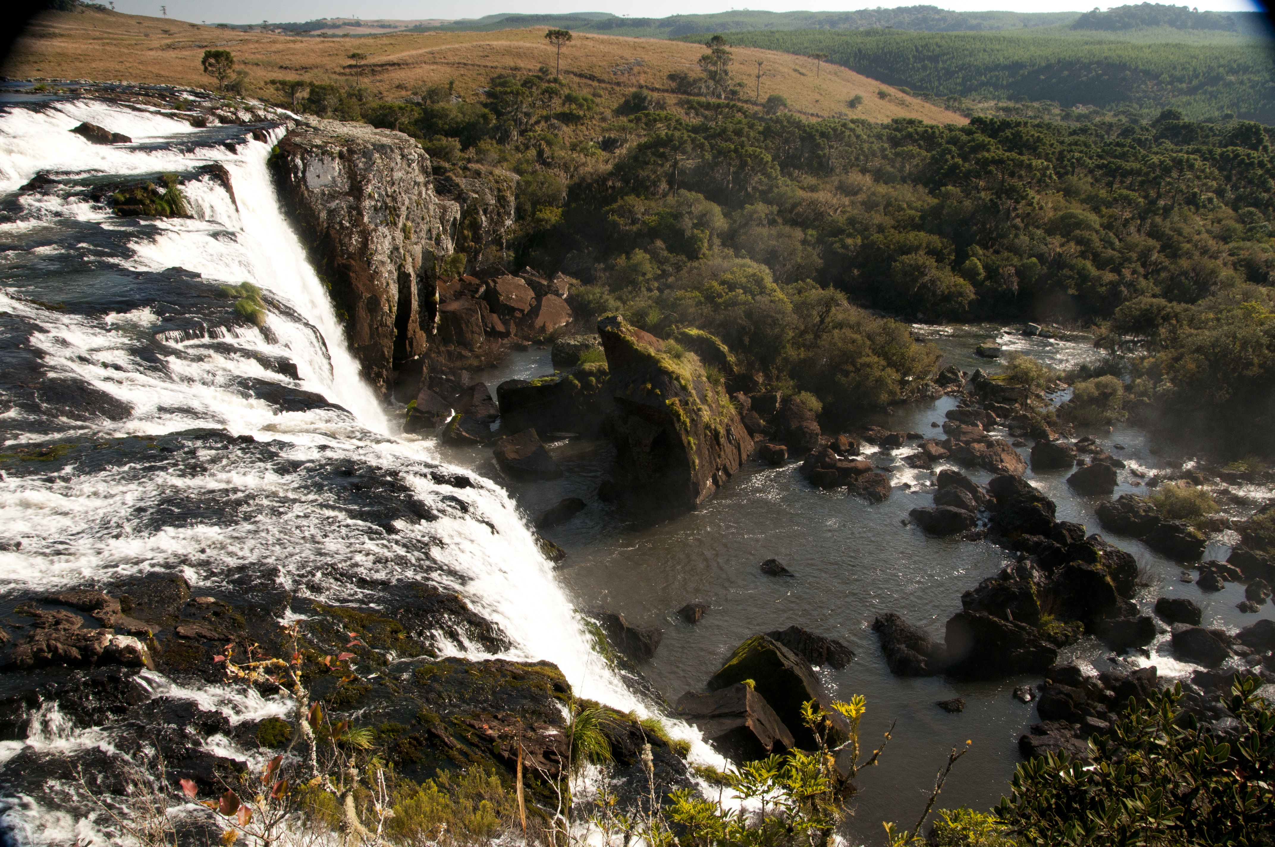 Cachoeira do Passo do S dentro do Parque Estadual do Tainhas.